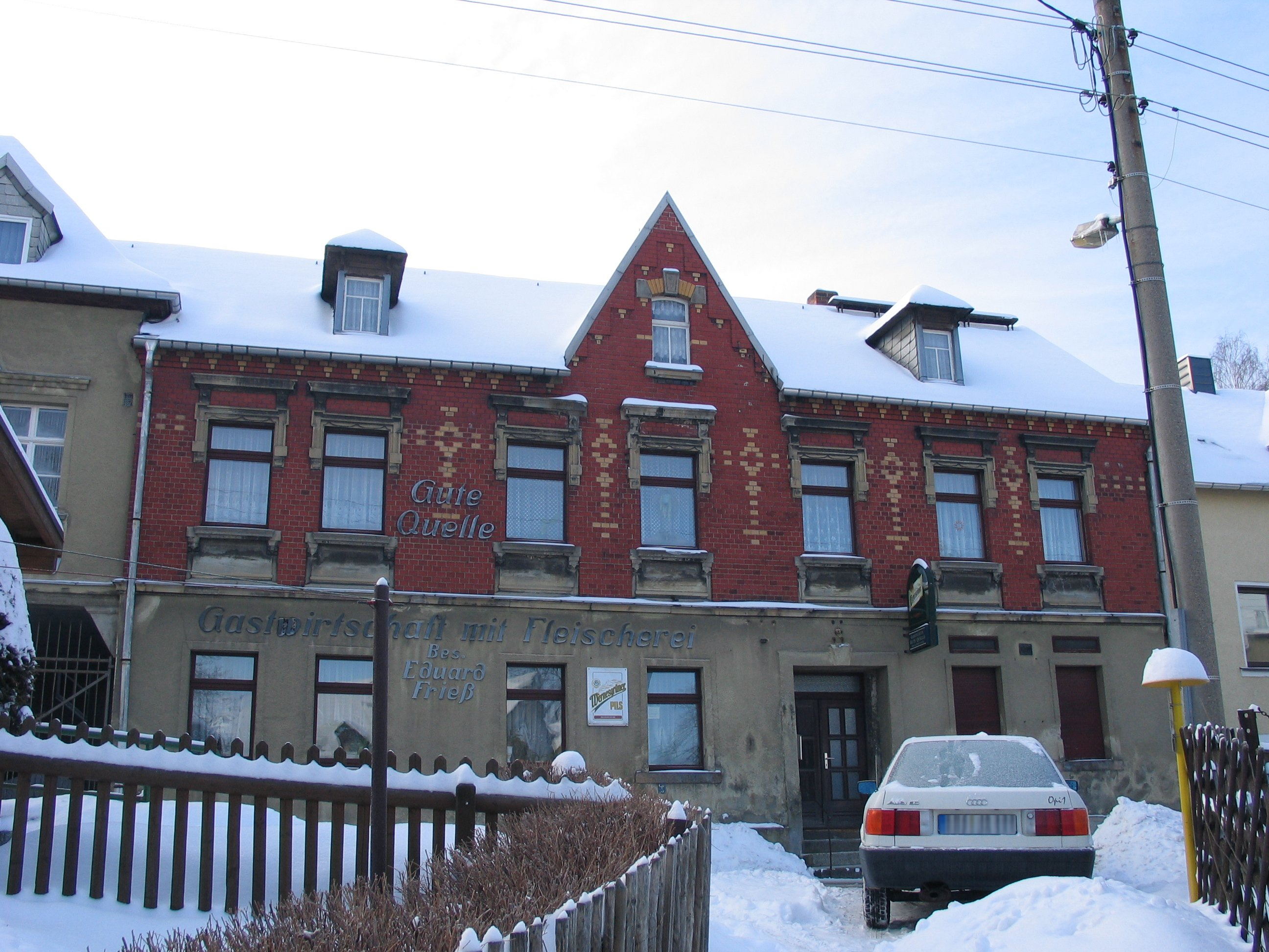 "Gute Quelle"-Gaststätte mit Anbau und historischer Beschriftung; Zeugnis des historischen Fremdenverkehrs im Ort, von bau- und ortsgeschichtlicher Bedeutung.